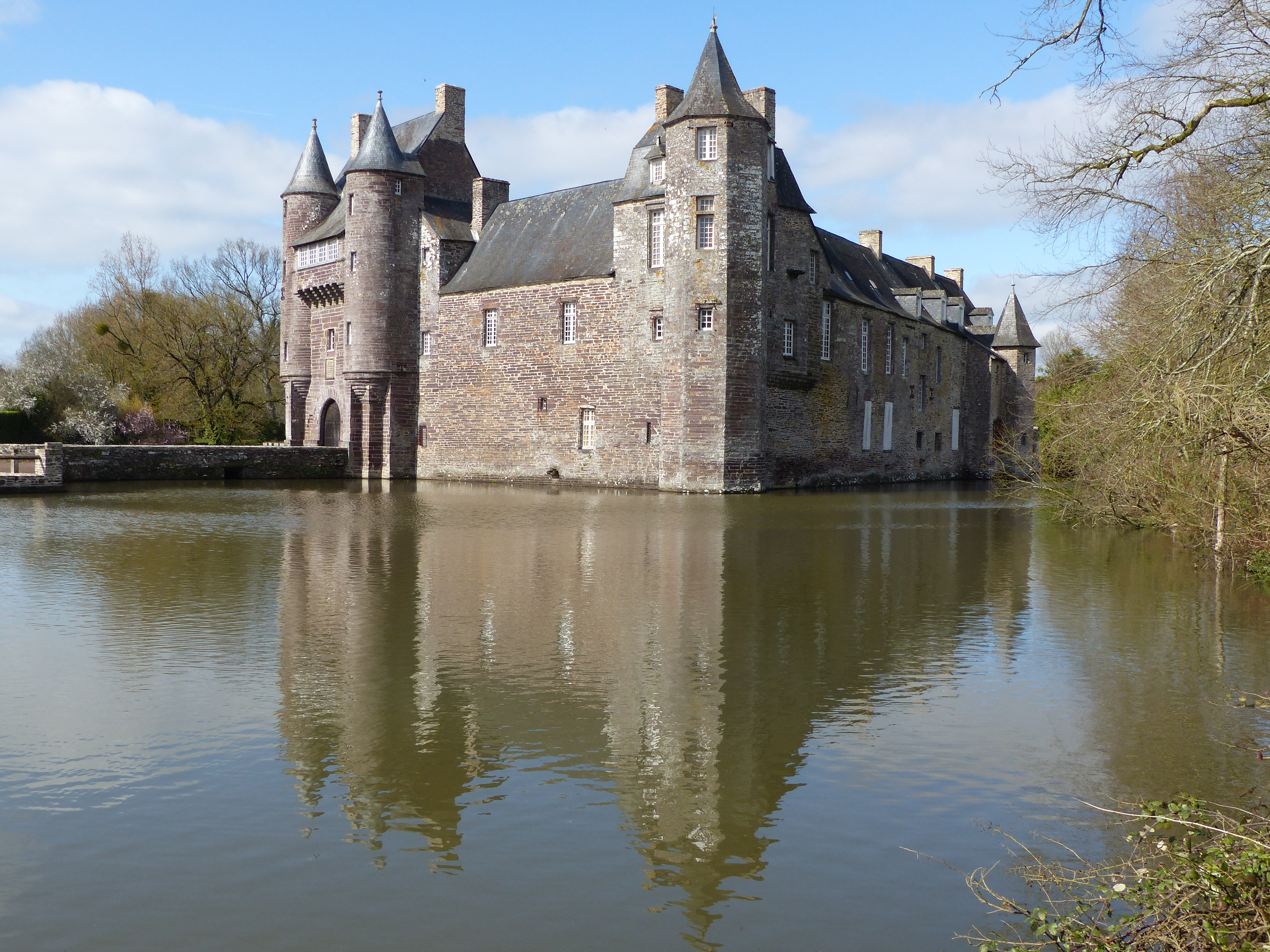 Le Château de Trécesson en mars 2017